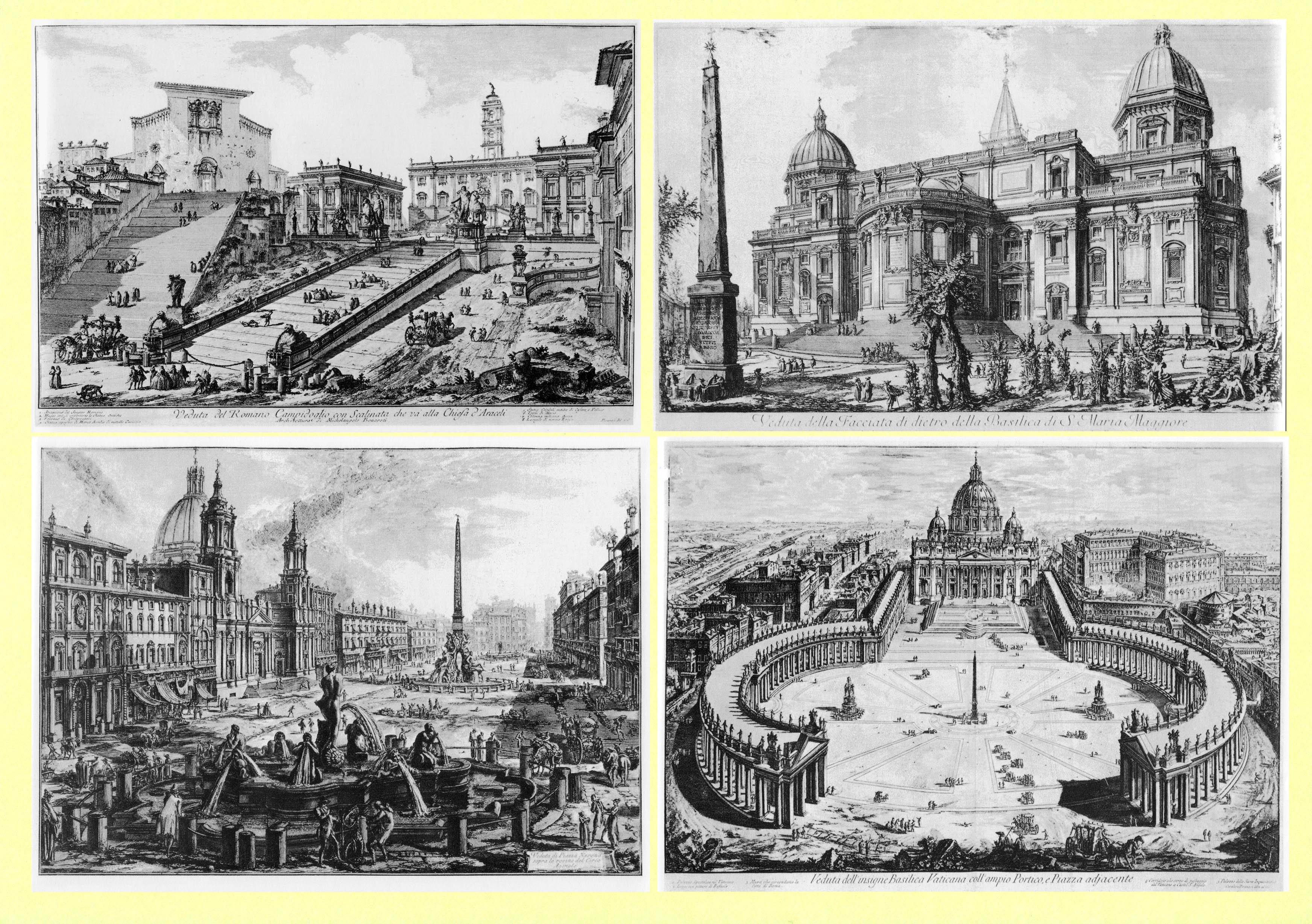 Piranesi vedutái